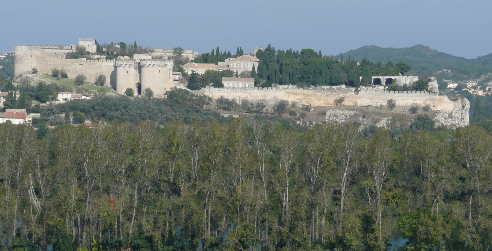 Vue sur Villeneuve-lès-Avignon depuis le jardin des dômes en Avignon.